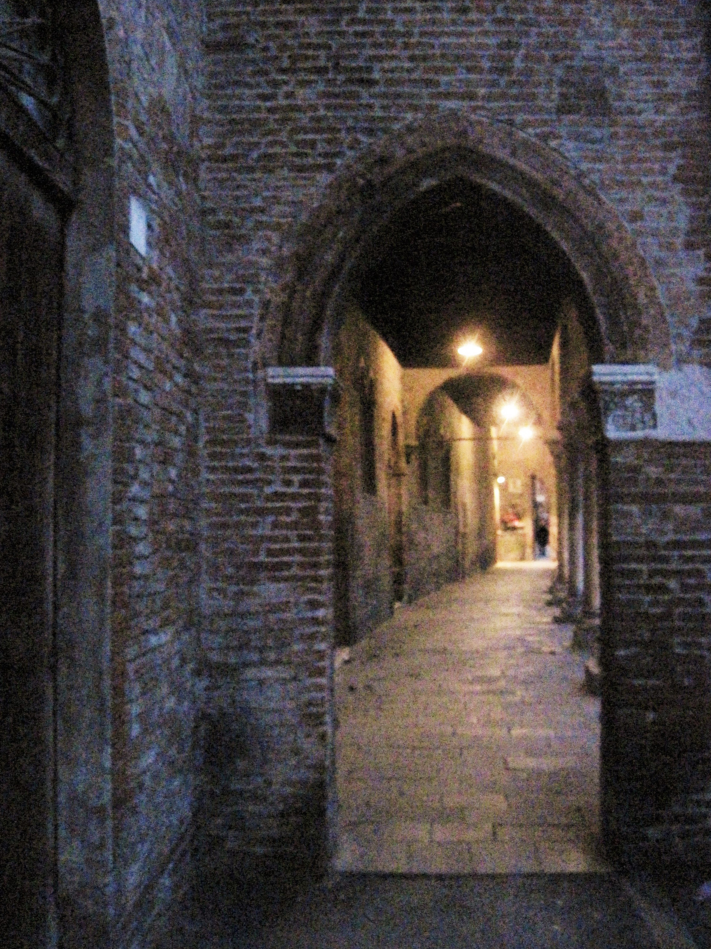 Via del nucleo medievale della città di Ferrara